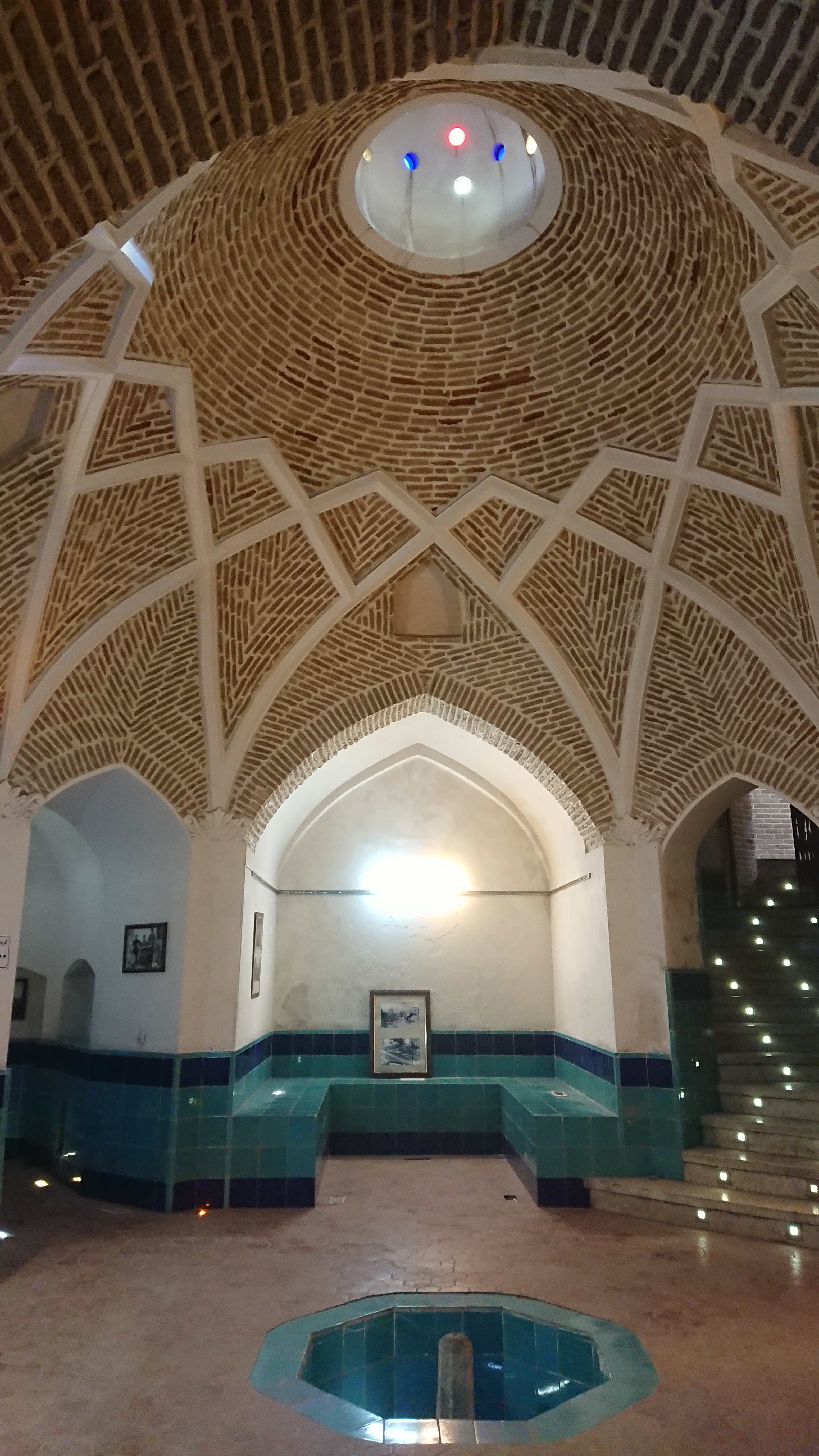 حمام نواب